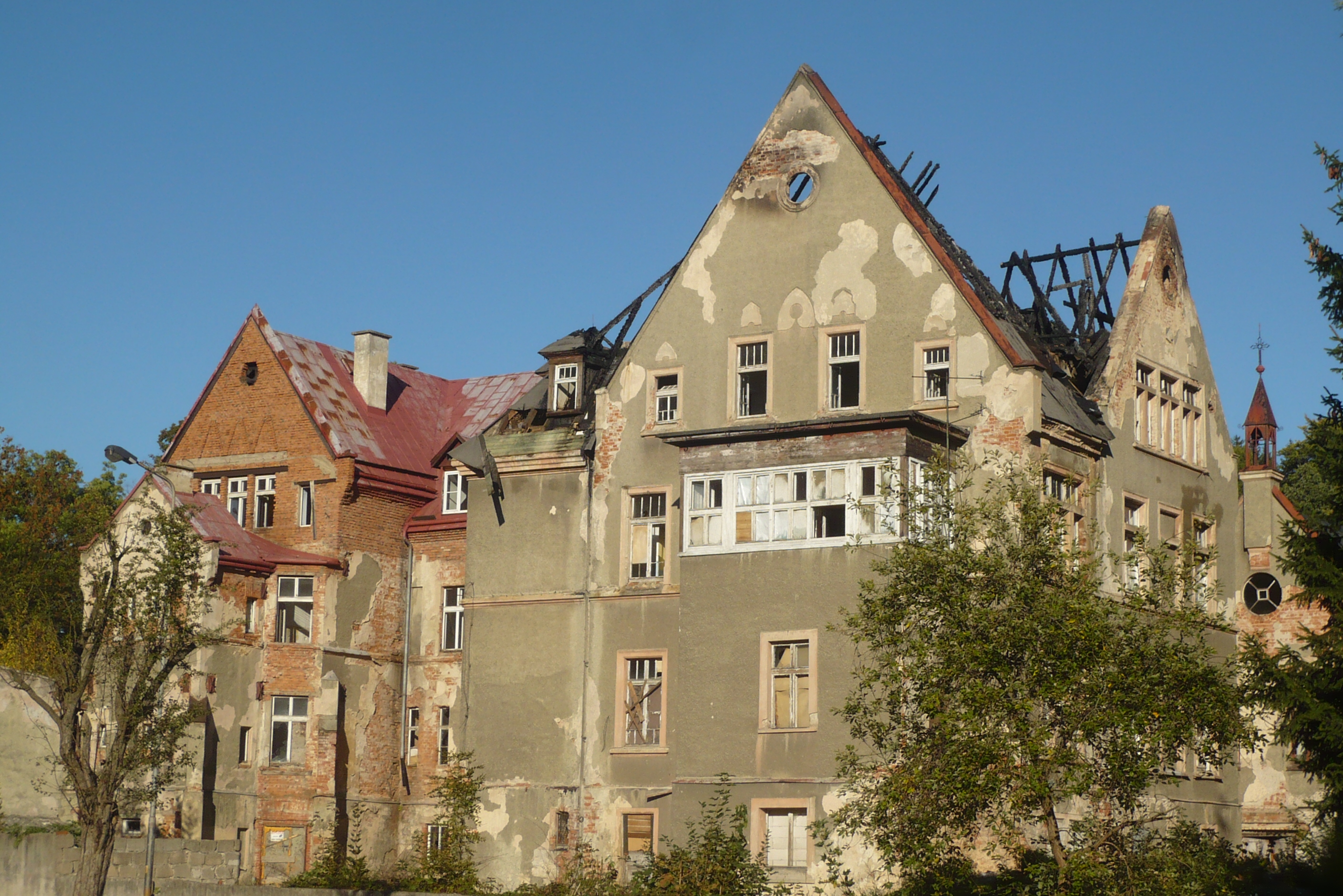 Szpital miejski w Nowej Rudzie